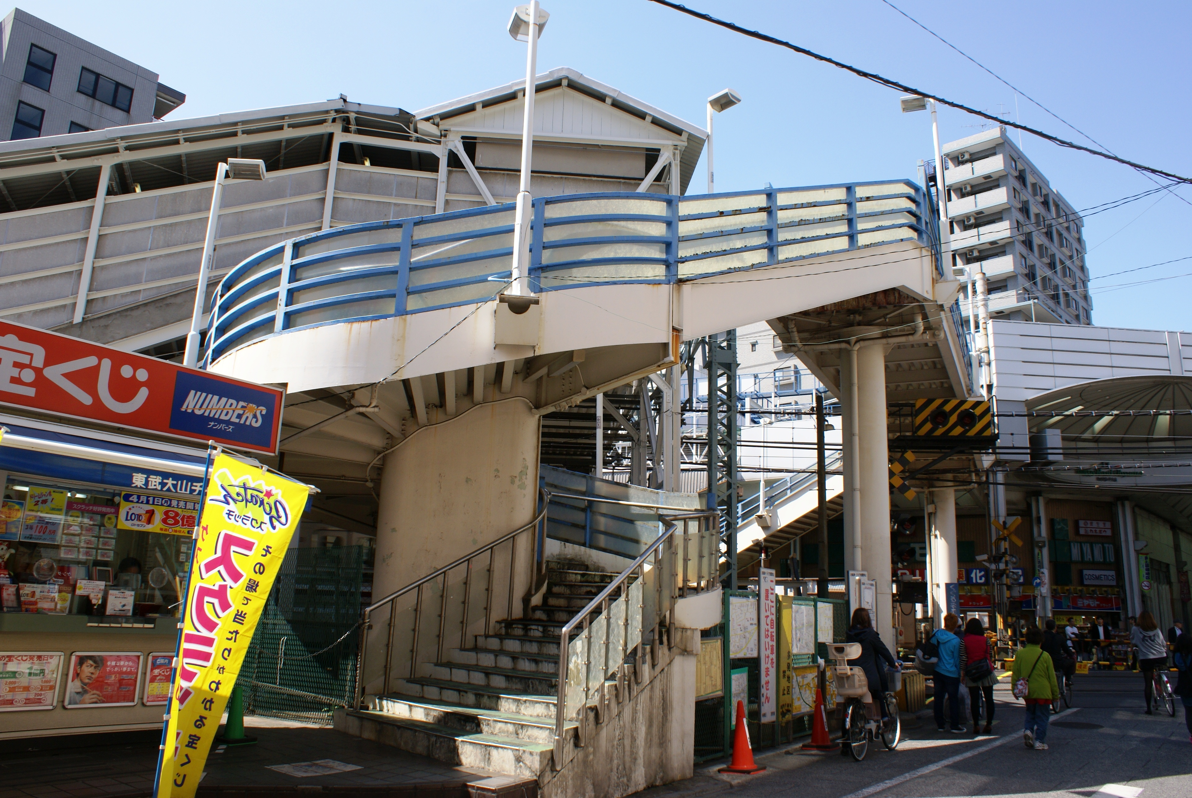 大山東町のらせん歩道橋